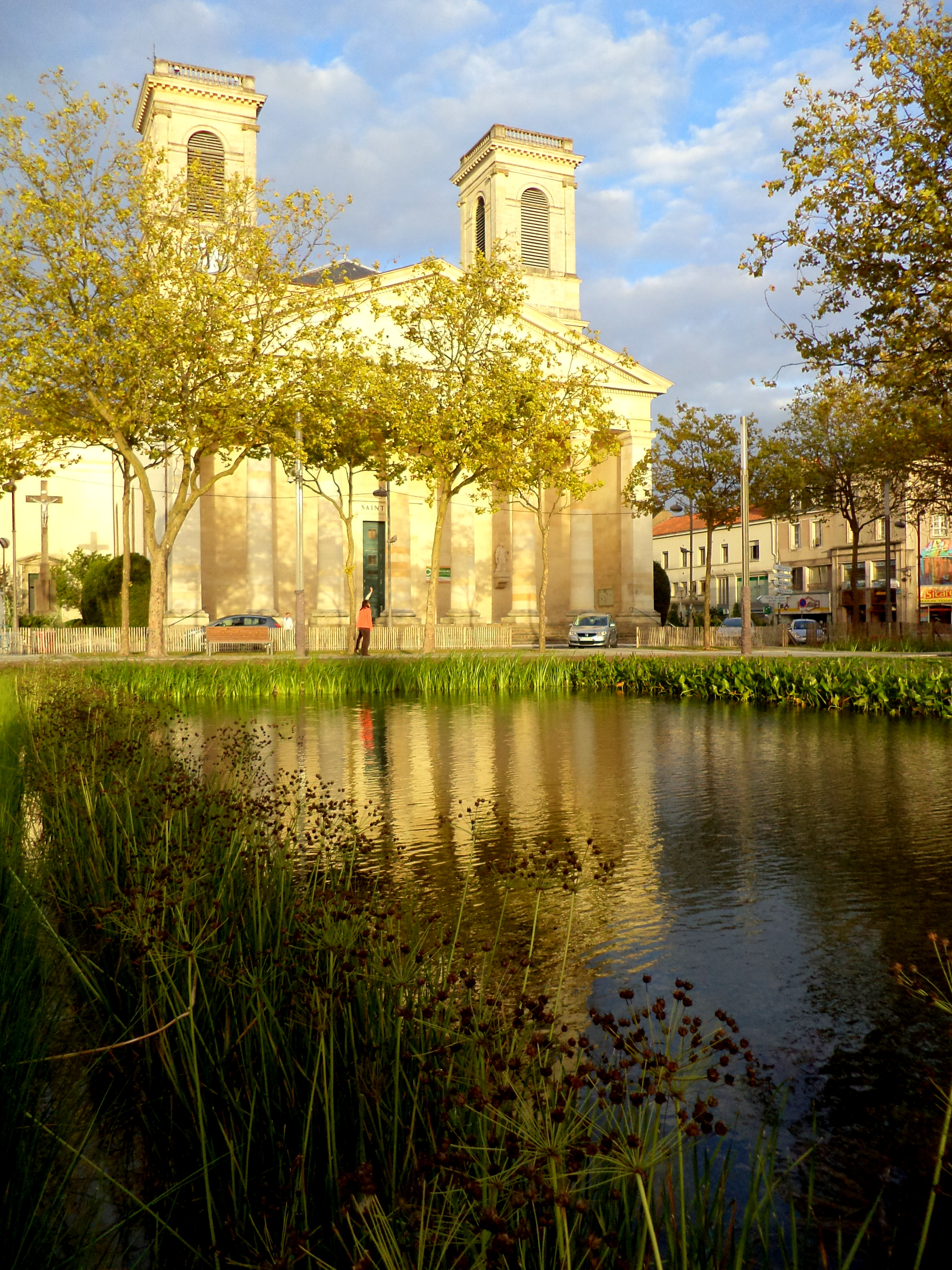 Réaménagement par Alexandre Chemetoff. Photo visible également sur Flickr (ChevillonW)